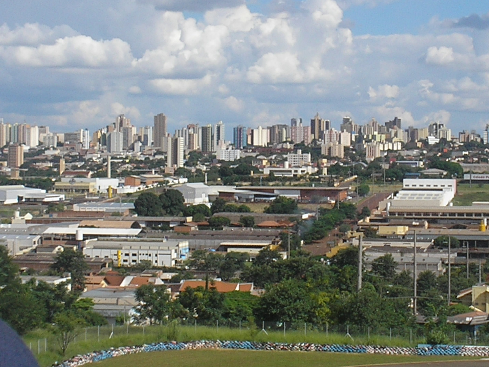 Centro de Londrina (Vista do Autódromo Ayrton Senna)